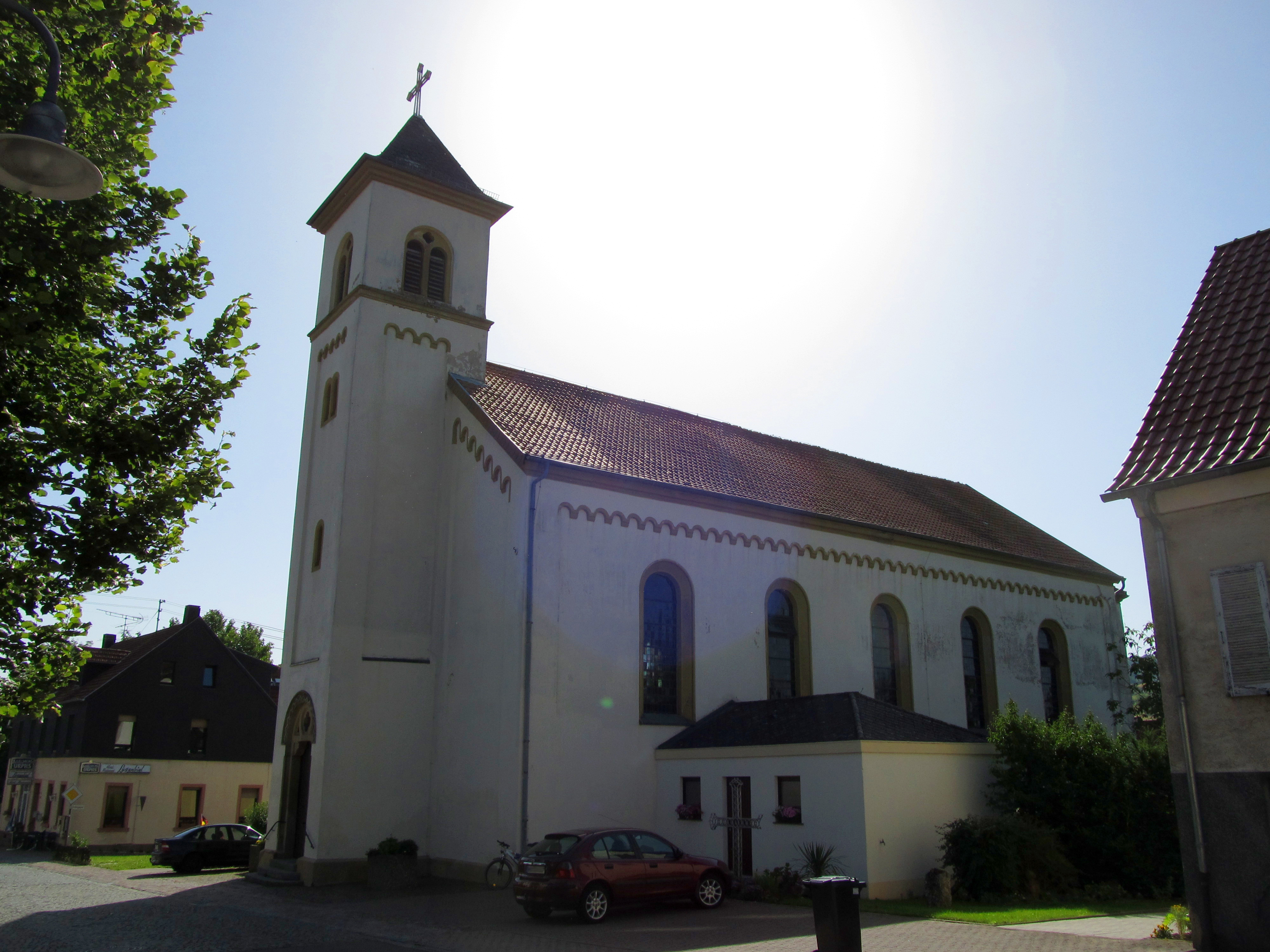 Die katholische Pfarrkirche St. Pirminius in Walsheim, einem Ortsteil der Gemeinde Gersheim, Saarland